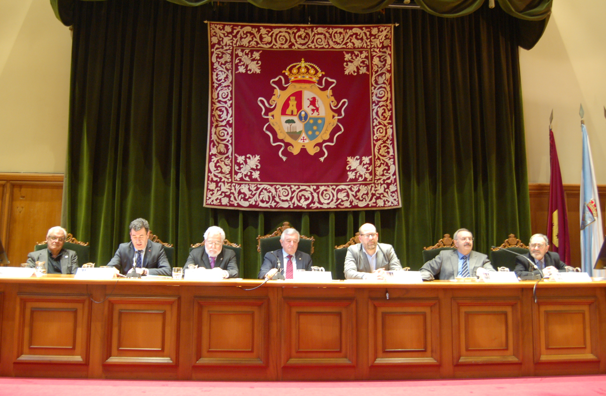 Autoridades na inauguración das xornadas Abril Oteriano 2018 no Salón de Pleno do Colexio de Fonseca. De esquerda a dereita, Víctor Freixanes, Román Rodríguez, Miguel Santalices, Juan Viaño, Martiño Noriega, Ramón Villares e Juan Luis Saco Cid